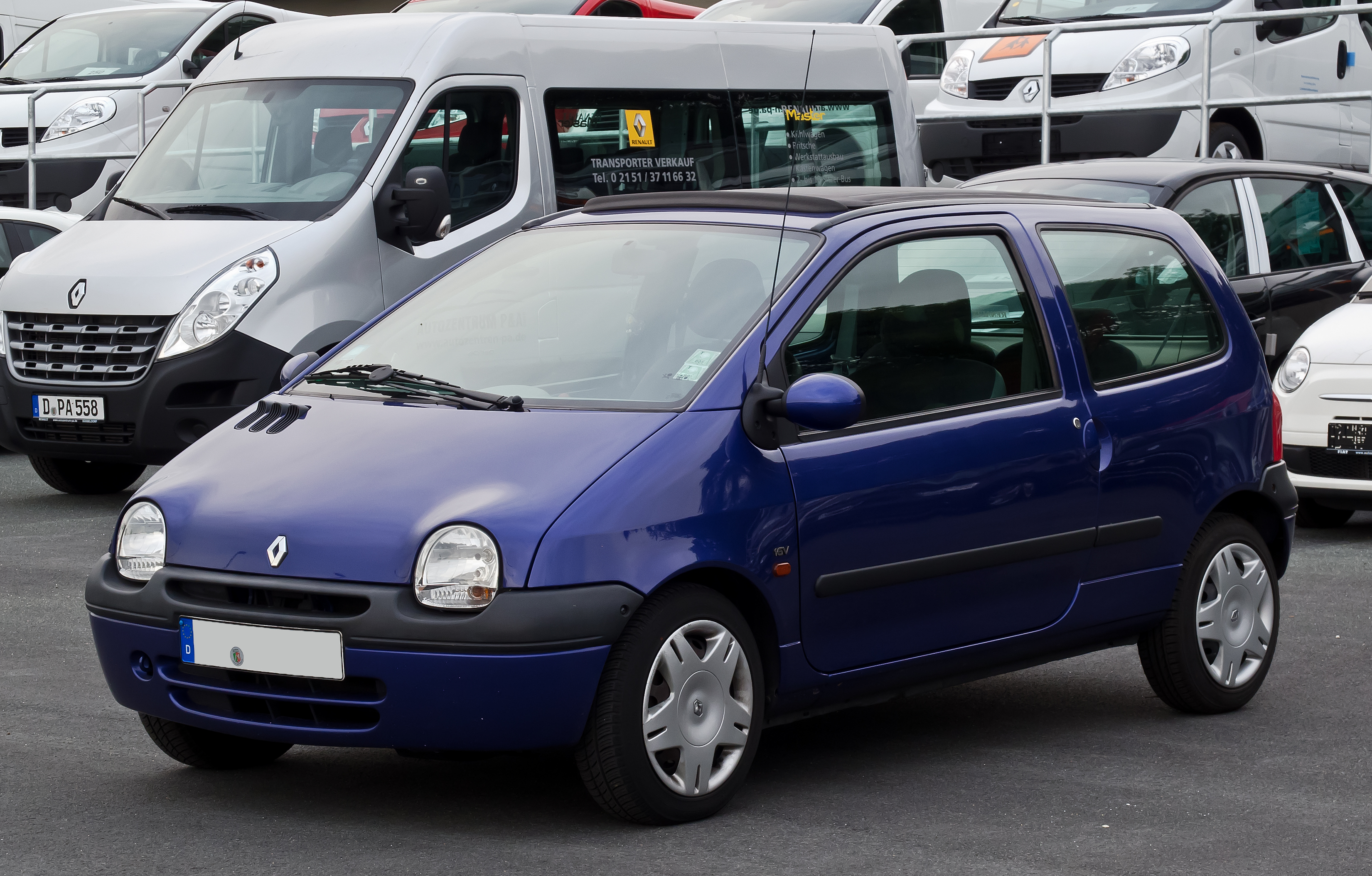 Renault Twingo (I, Facelift)